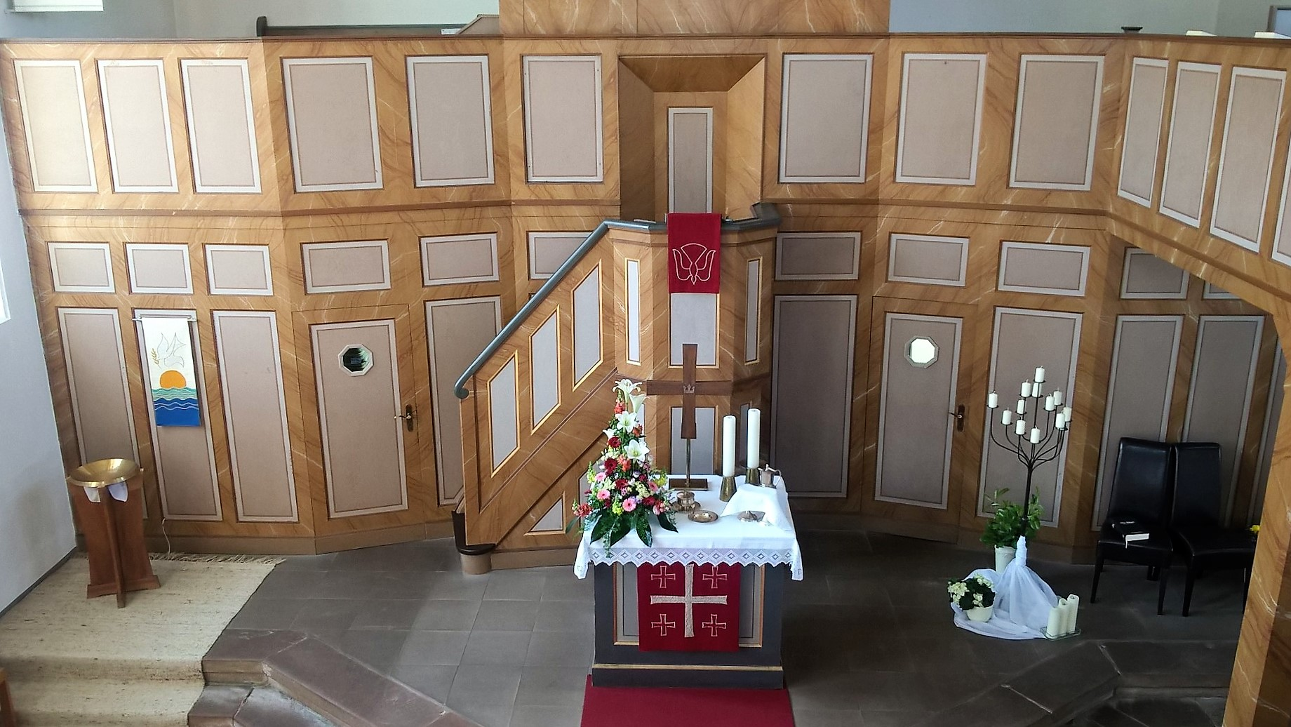 Evangelische Kirche Lumda, Grünberg, Landkreis Gießen, Hessen, Deutschland